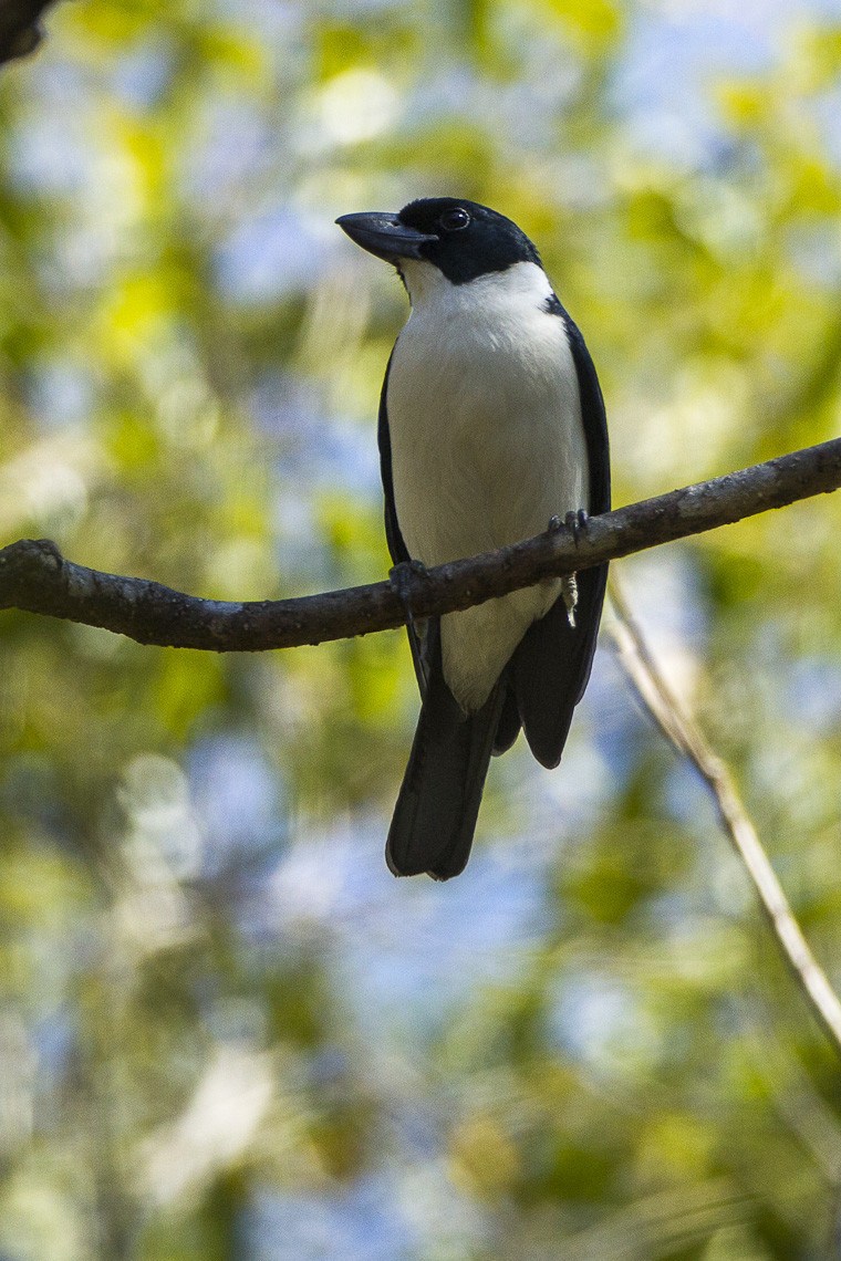 Van dam's Vanga - Ankarafantsika - Madagascar_S4E9370